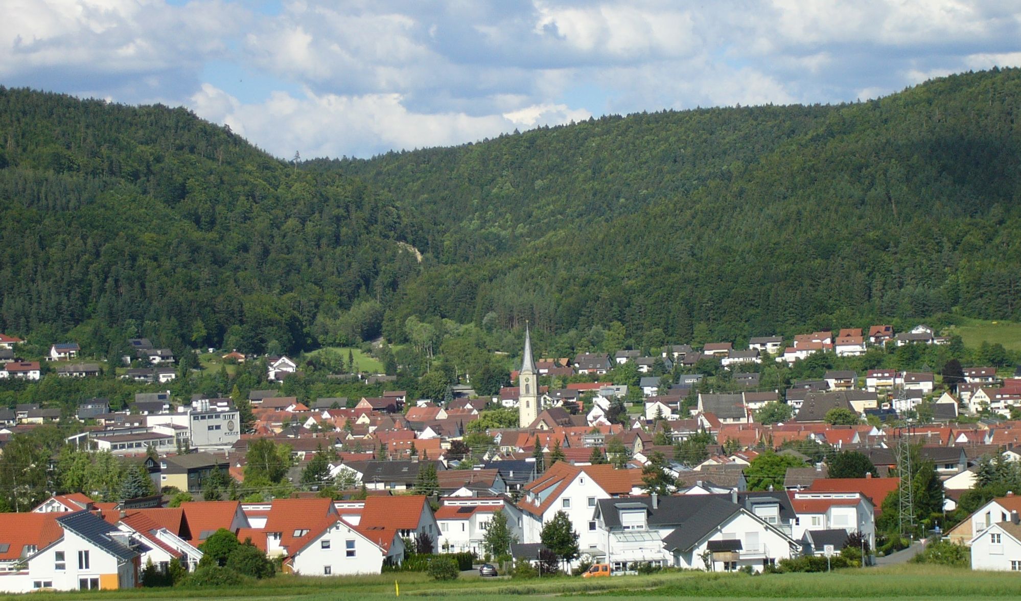 Wurmlingen near Tuttlingen, Baden-Wuerttemberg (Germany)